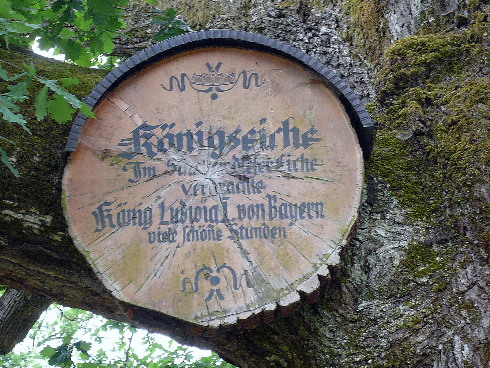 Inschrifttafel an der König-Ludwig-Eiche